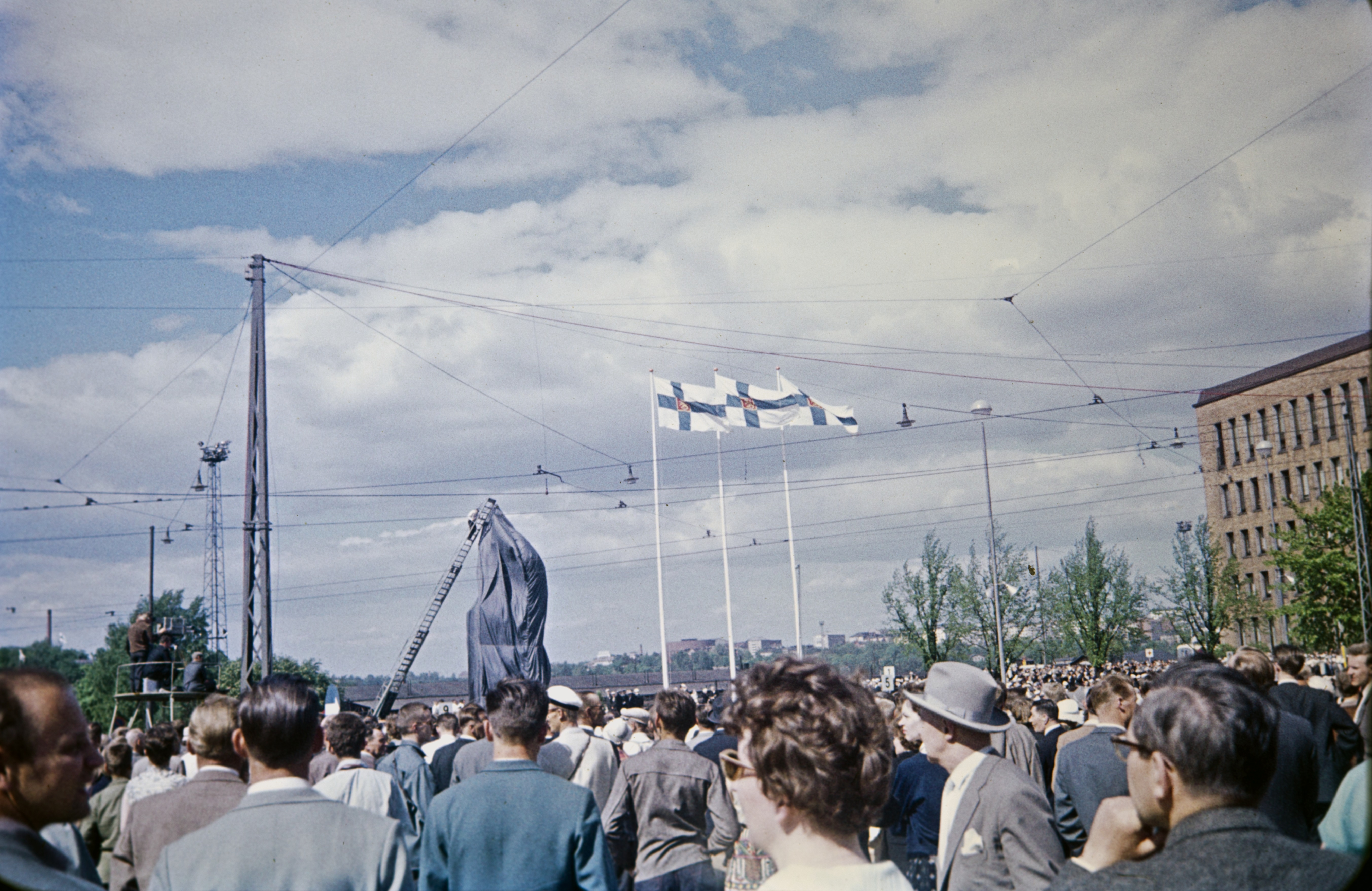 19600604 . Mannerheiminaukio. Mannerheimin ratsastajapatsaan paljastus. Yleisöä katsomassa patsaan paljastusta. Vasemmalla televisiokamera jalustalla, veistos kankaaseen käärittynä, tikas, kolme leijonalippua, oikealla Postitalon kulma